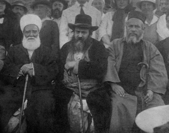 הרבנים יעקב חי זריהן ומשה קליערס בטקס בטבריה